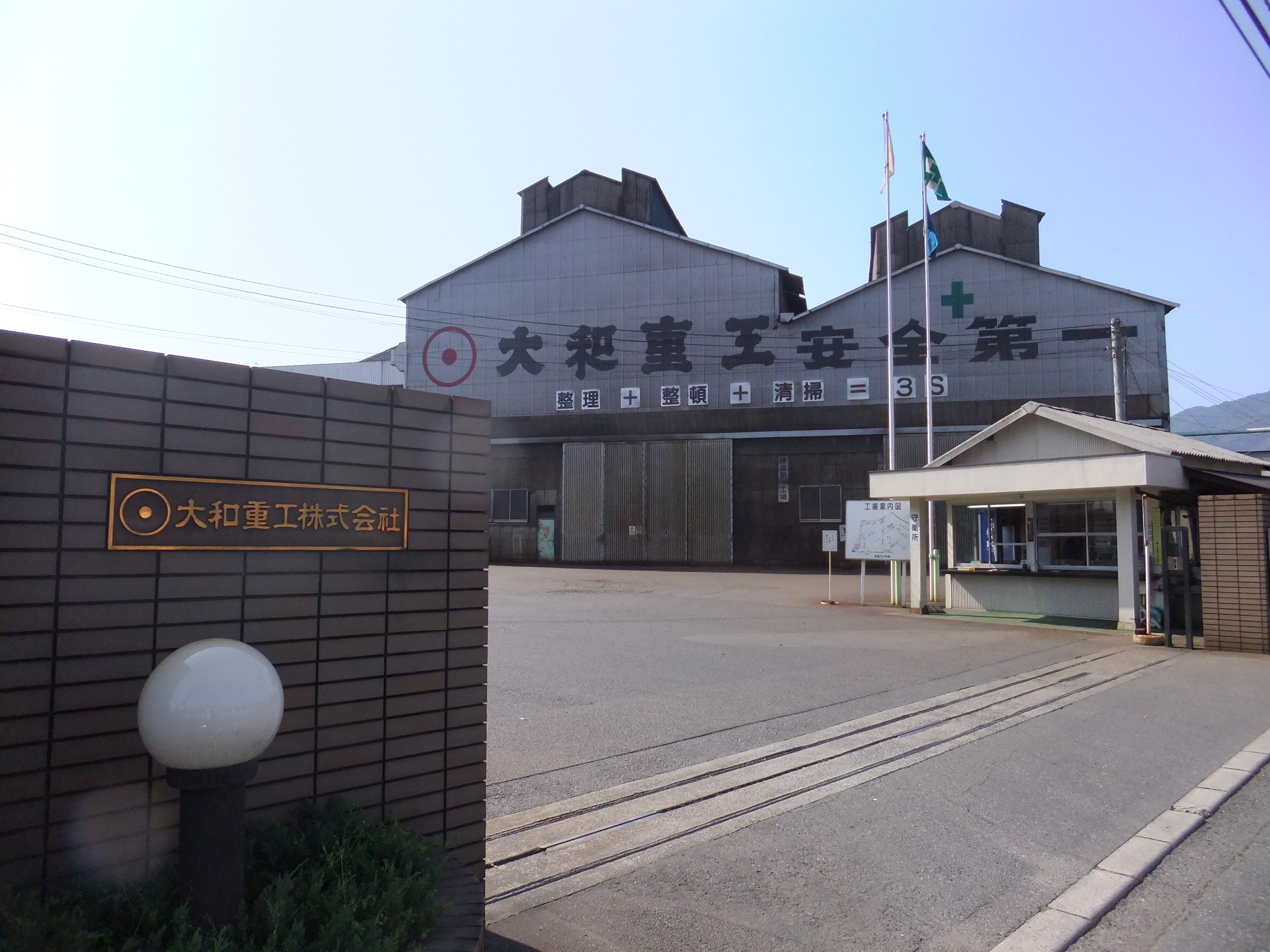 大和重工本社